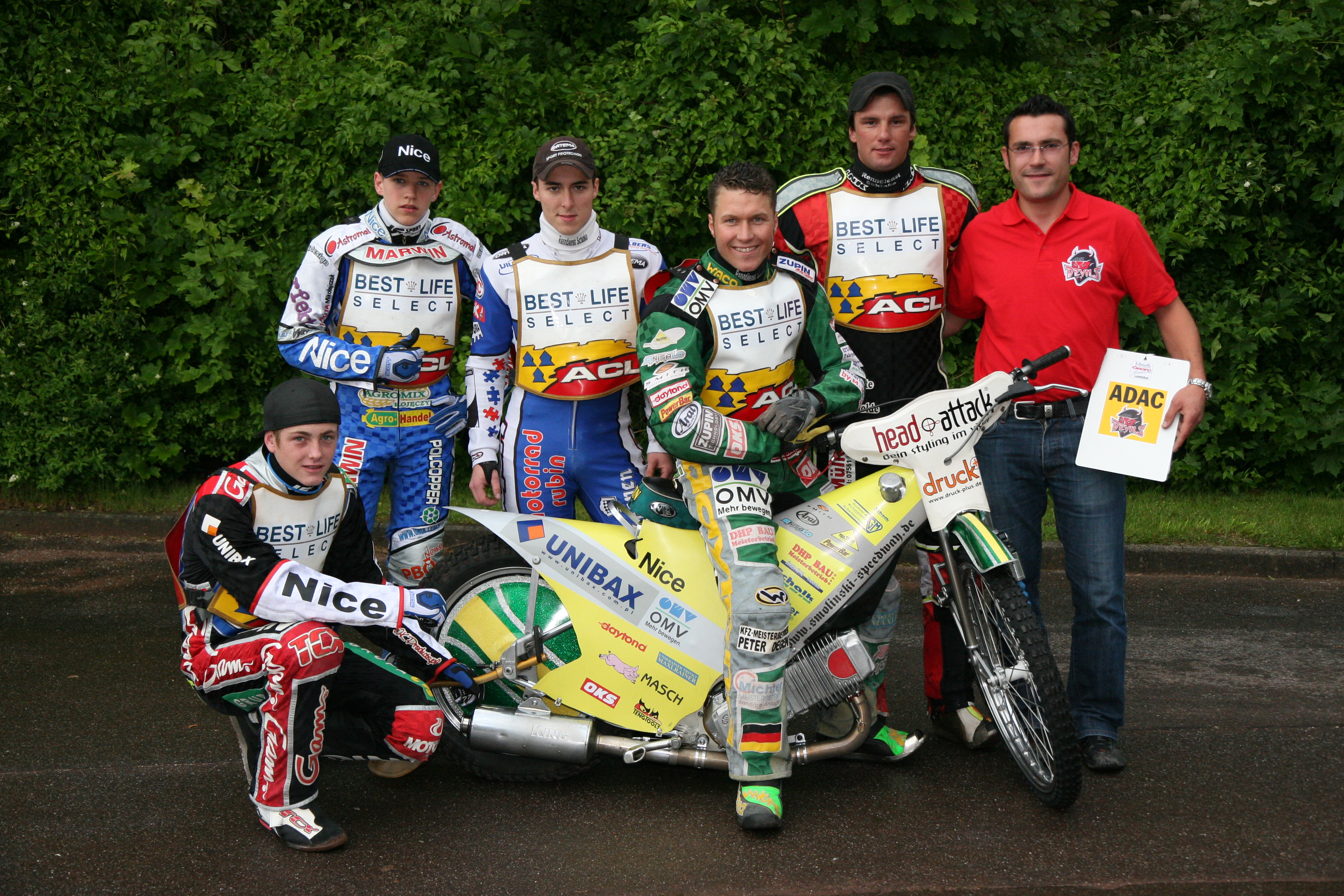 Mannschaftsbild AC Landshut Devils Saison 2009